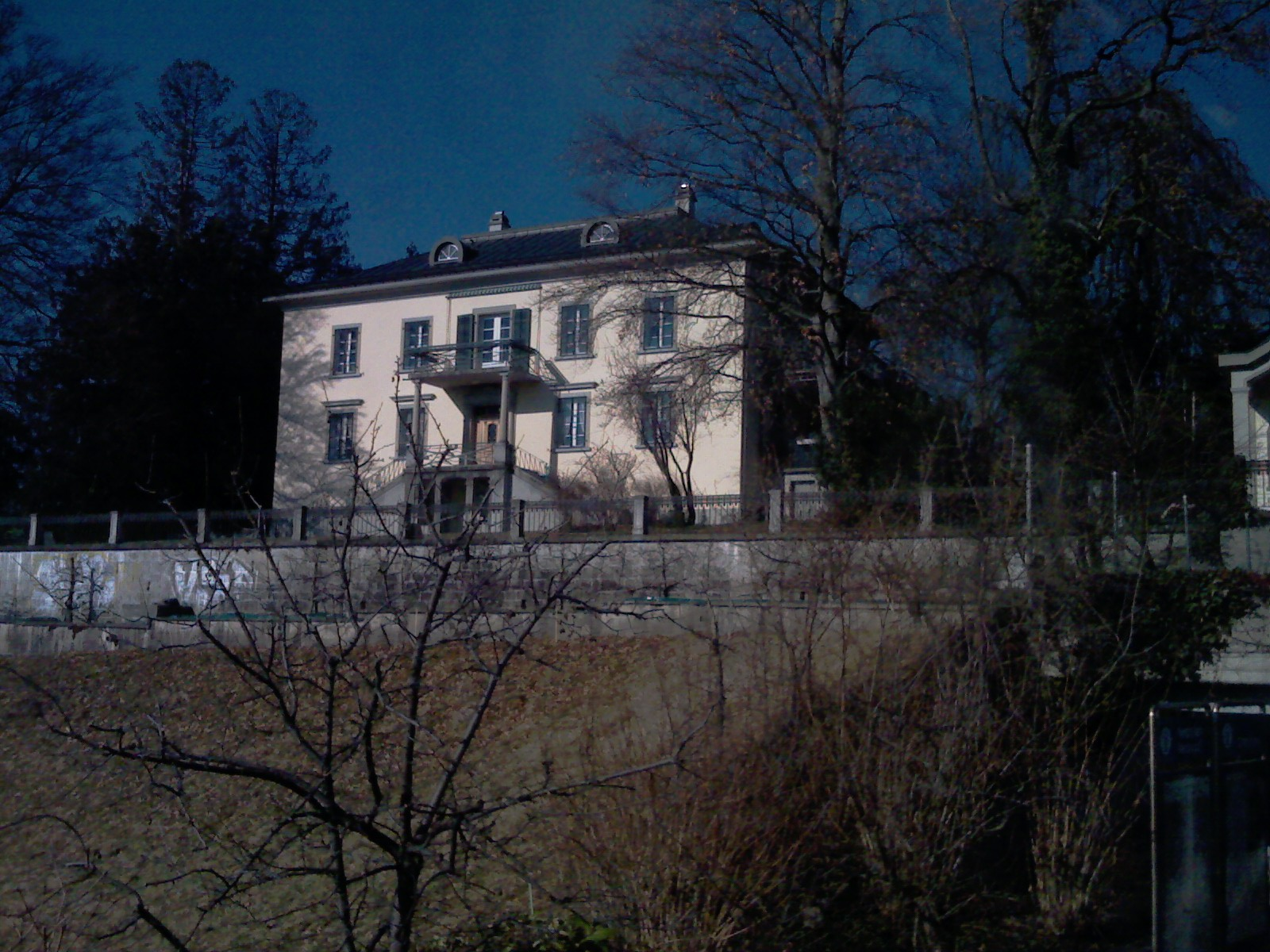 Villa Grünfelds at Jona SG - Vilao Gruenfelds en Jona SG